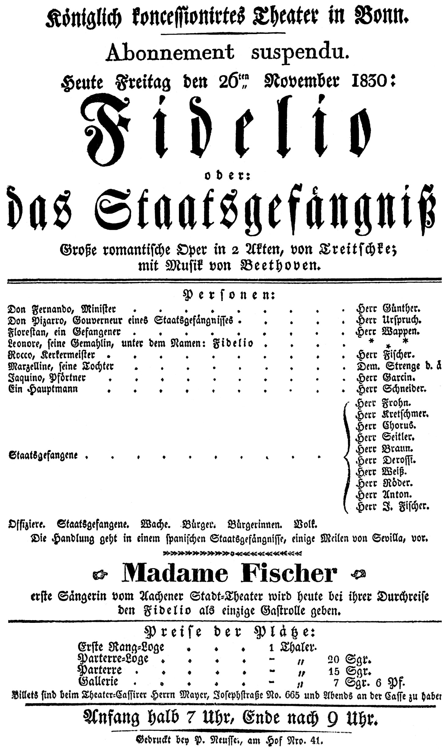 Theaterzettel der ersten nachweisbaren Aufführung von Ludwig van Beethovens Oper Fidelio in Bonn am 26. November 1830